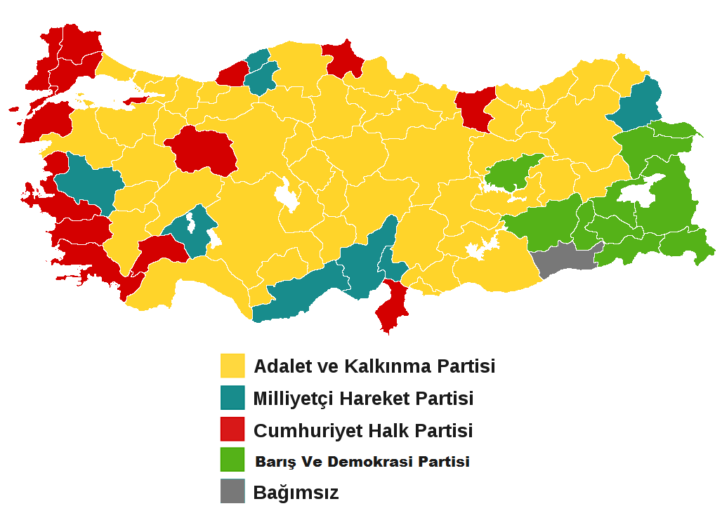 2014 Türkiye genel seçimleri sonuçları.